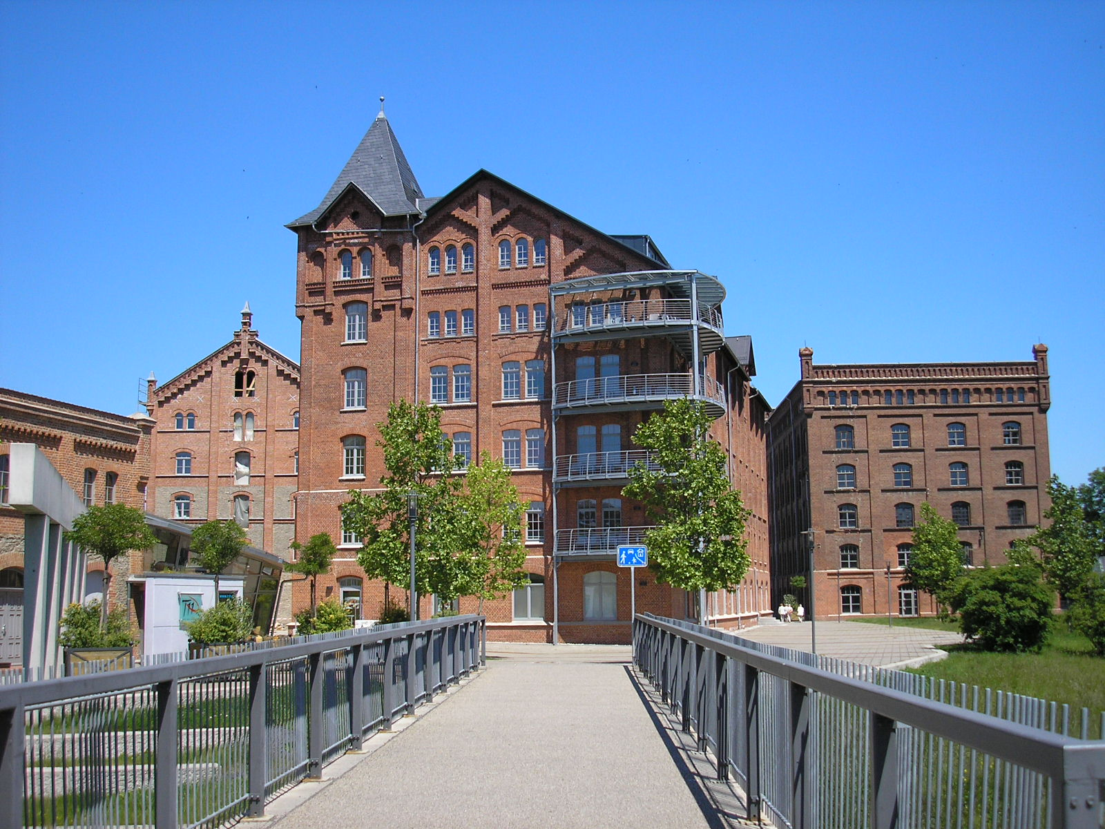 Fabriken auf dem Gelände der Landesgartenschau in Pößneck (Thüringen).